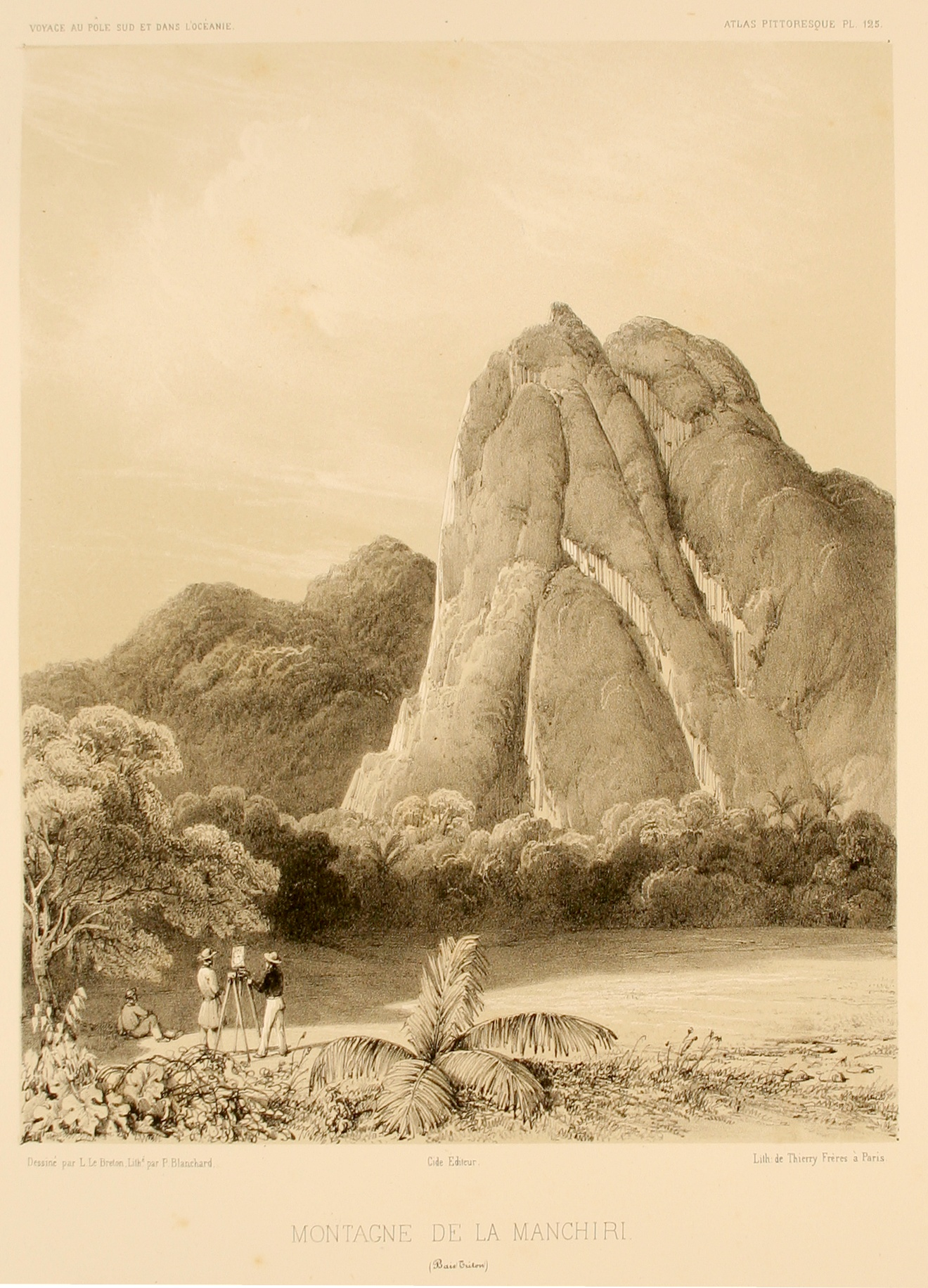 Montagne de la Menchiri. Atlas pittoresque, planche 125